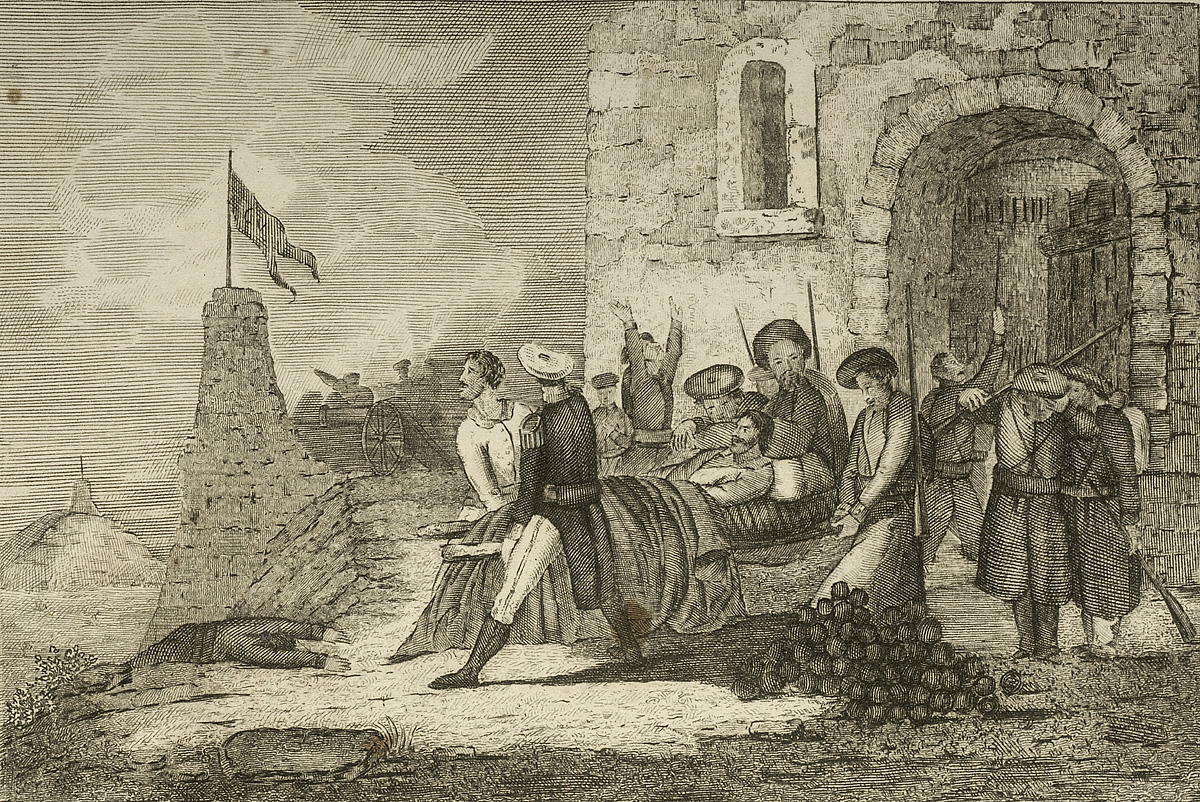 Zumalakarregi, herido de bala mientras inspeccionaba el sitio de Bilbao el 15 de junio de 1835